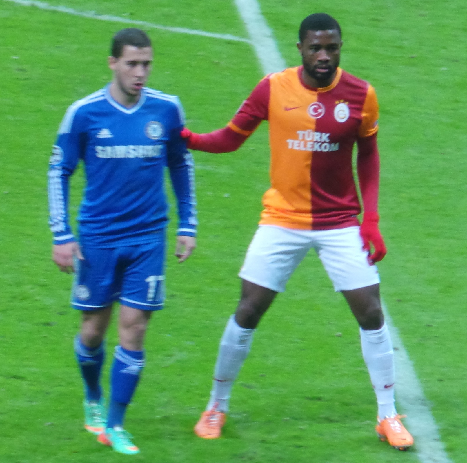 Aurélien Chedjou & Eden Hazard